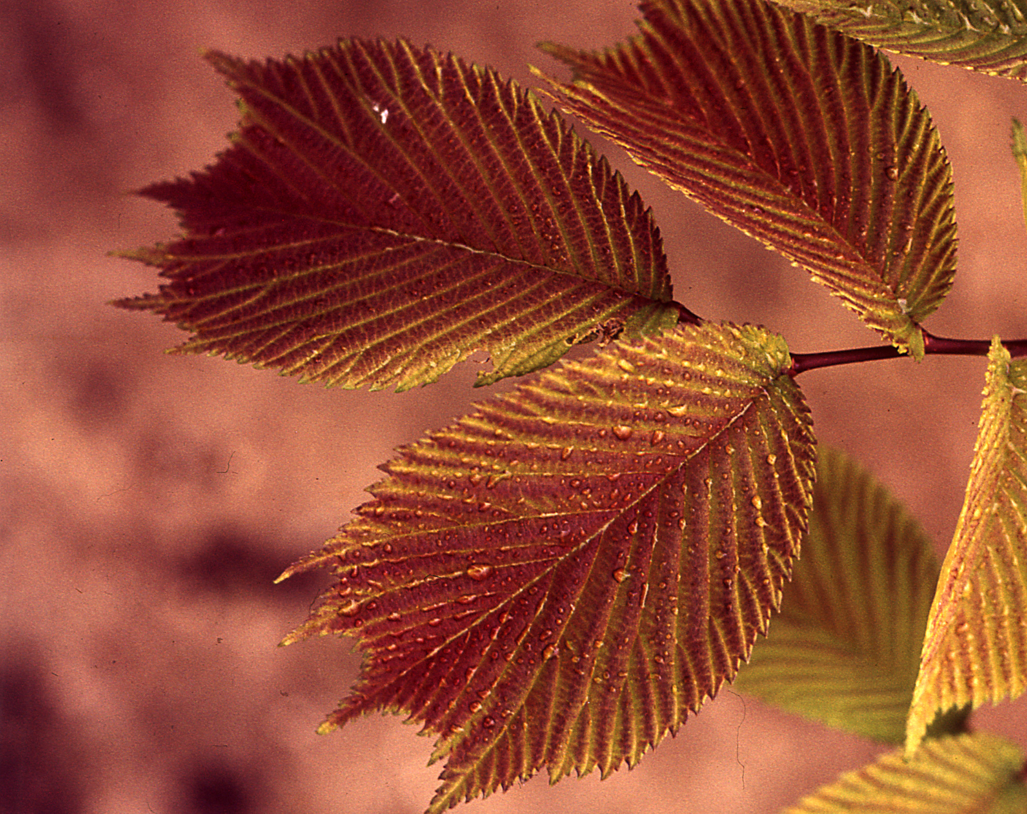 Лист азијског бреста Ulmus laciniata (фото: Михаило Грбић, Wageningen 1984)